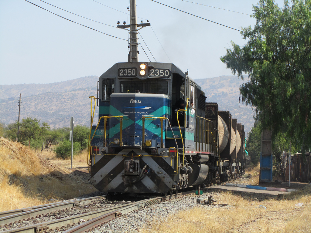 Locomotora numerada como D-2350 pasando por Montenegro con la carga de la empresa KDM, llegando al destino final que es el vertedero de Montenegro.